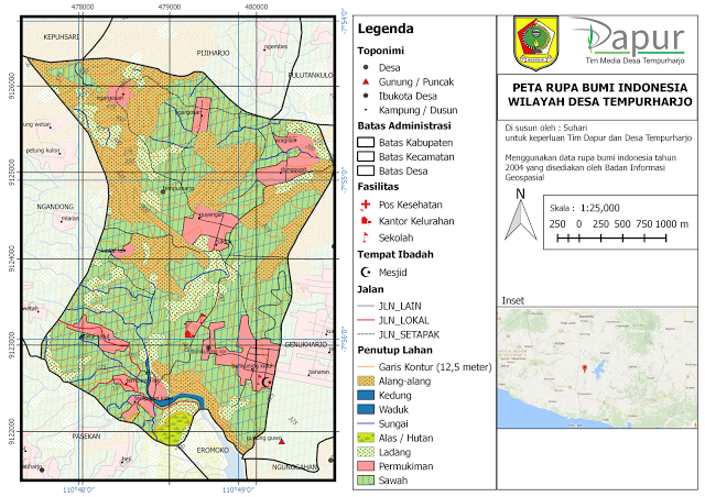 Disusun oleh Suhari (Ketua TIM DAPUR) menggunakan data BIG, 2004